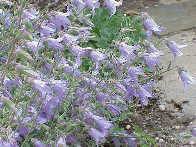 Species: Campanula sarmatica Family: Campanulaceae Image No. 2